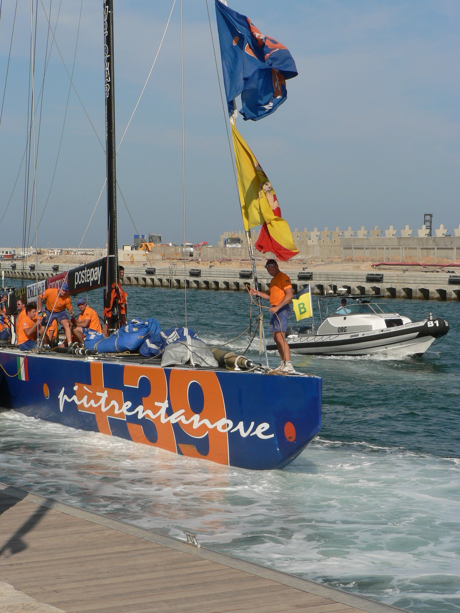 Coupe de l'America 2007 - +39 Challenge